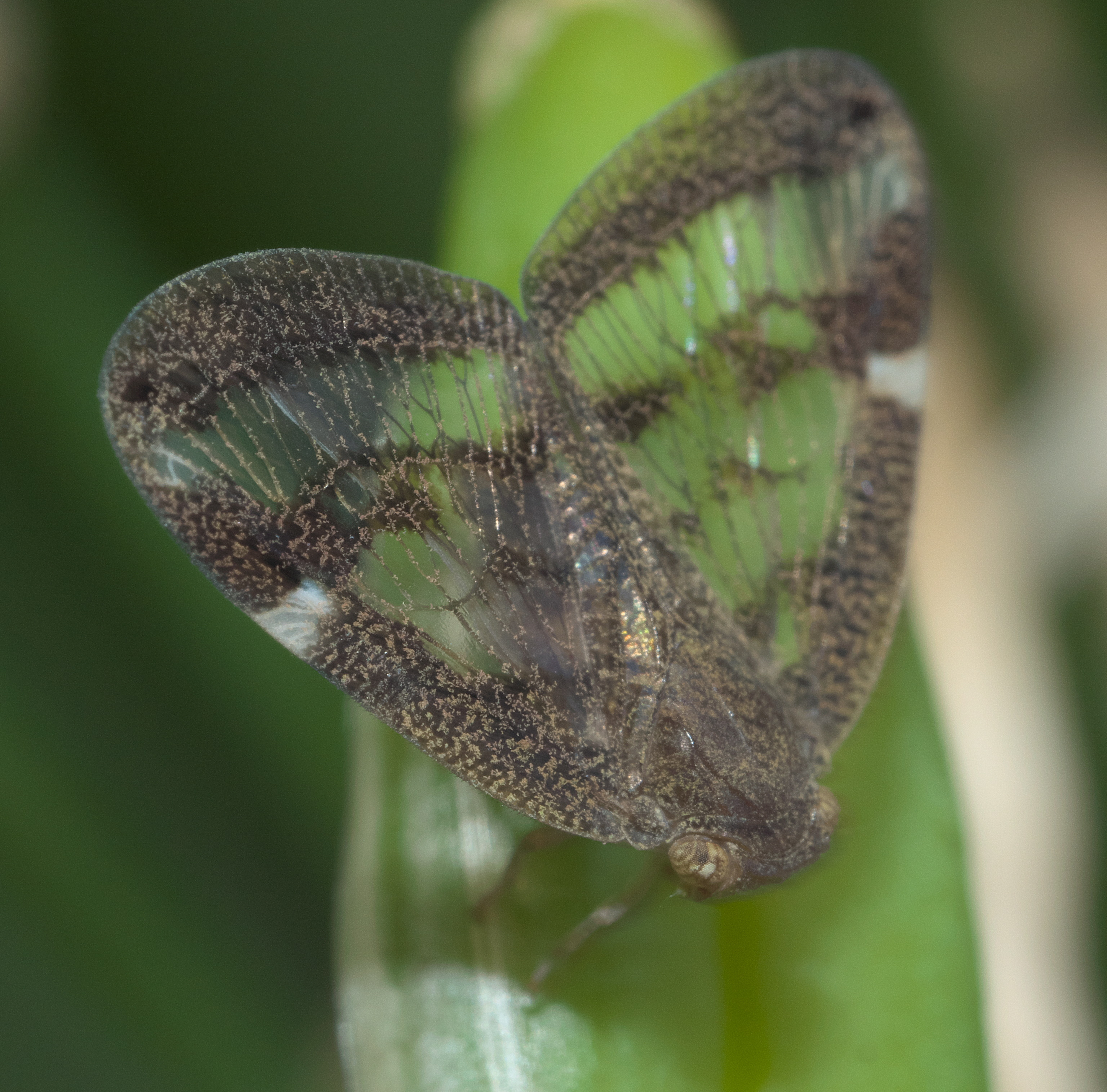 Scolypopa australis, passionvine hopper, ID Confidence: 90